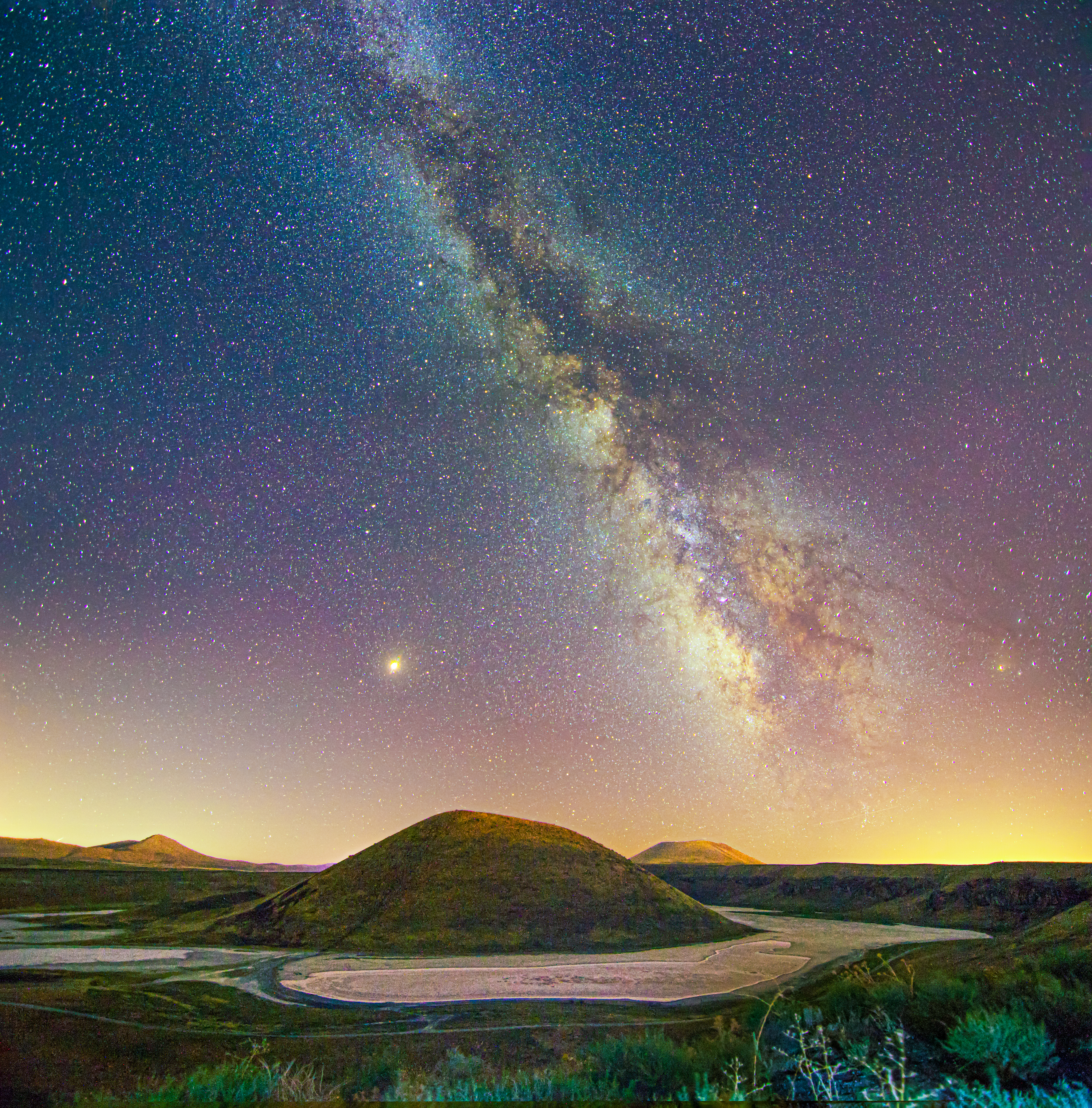 Ağustos ayında tamamen buharlaşmış olan Meke Gölü'nün gece manzarası.